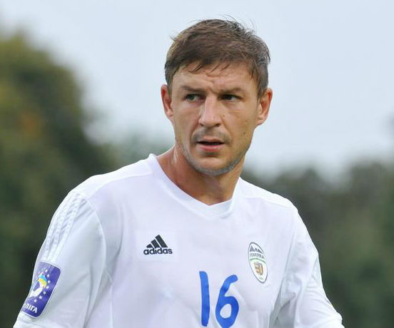 Максим Щацьких у Говерлі